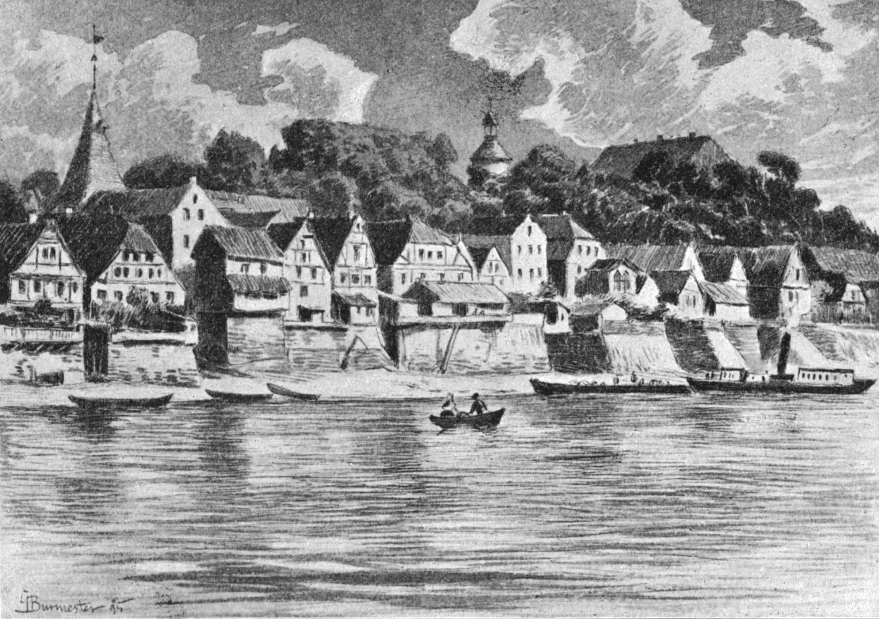 Lauenburg an der Elbe um 1895, gezeichnet von Georg Burmester